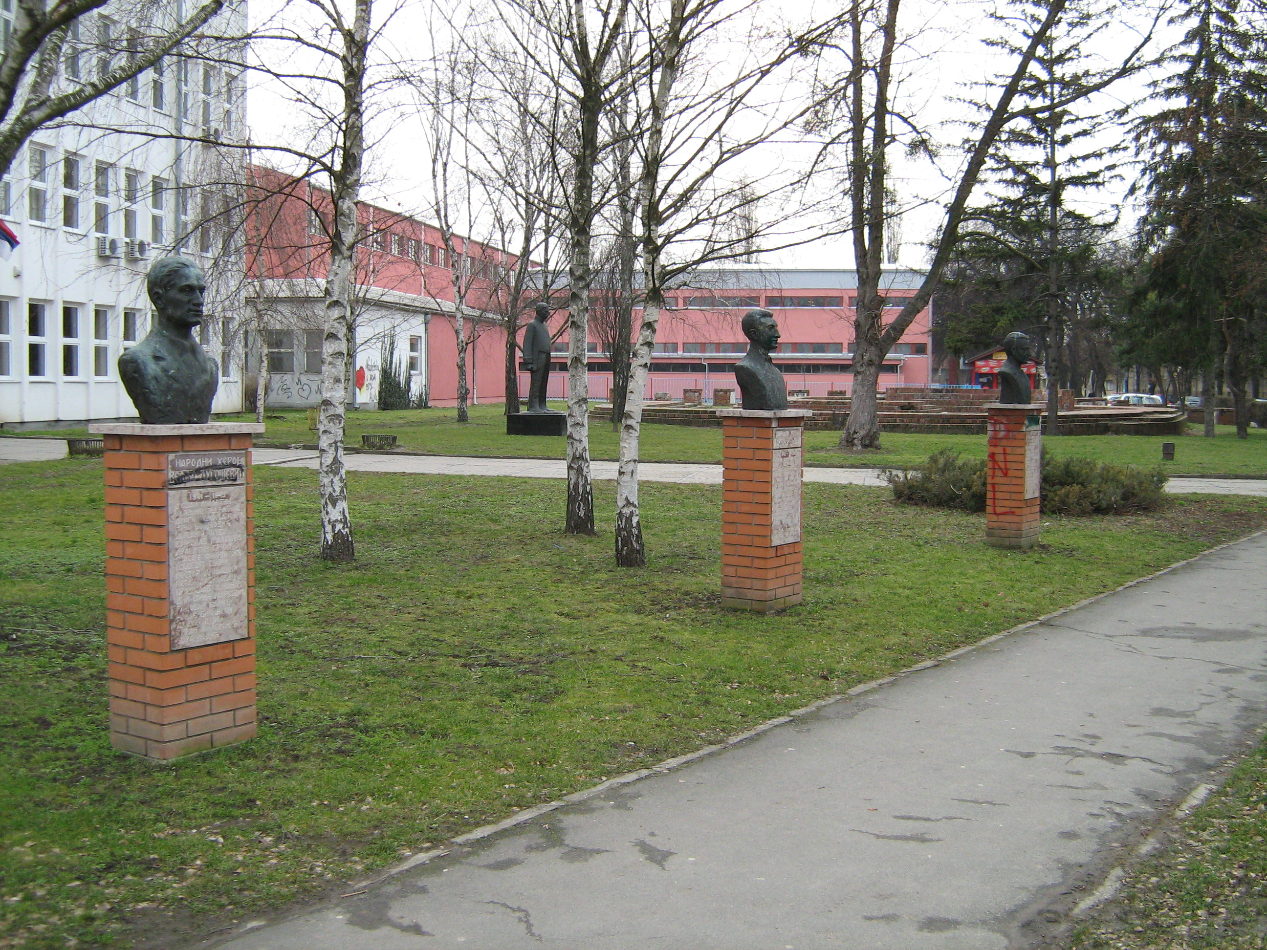 Споменик народним херојима испред факултета у Сомбору